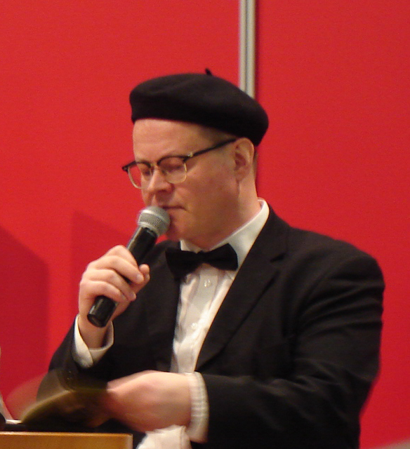 Pasi Heikura, Jyväskylän Kirjamessut 12. huhtikuuta 2008.